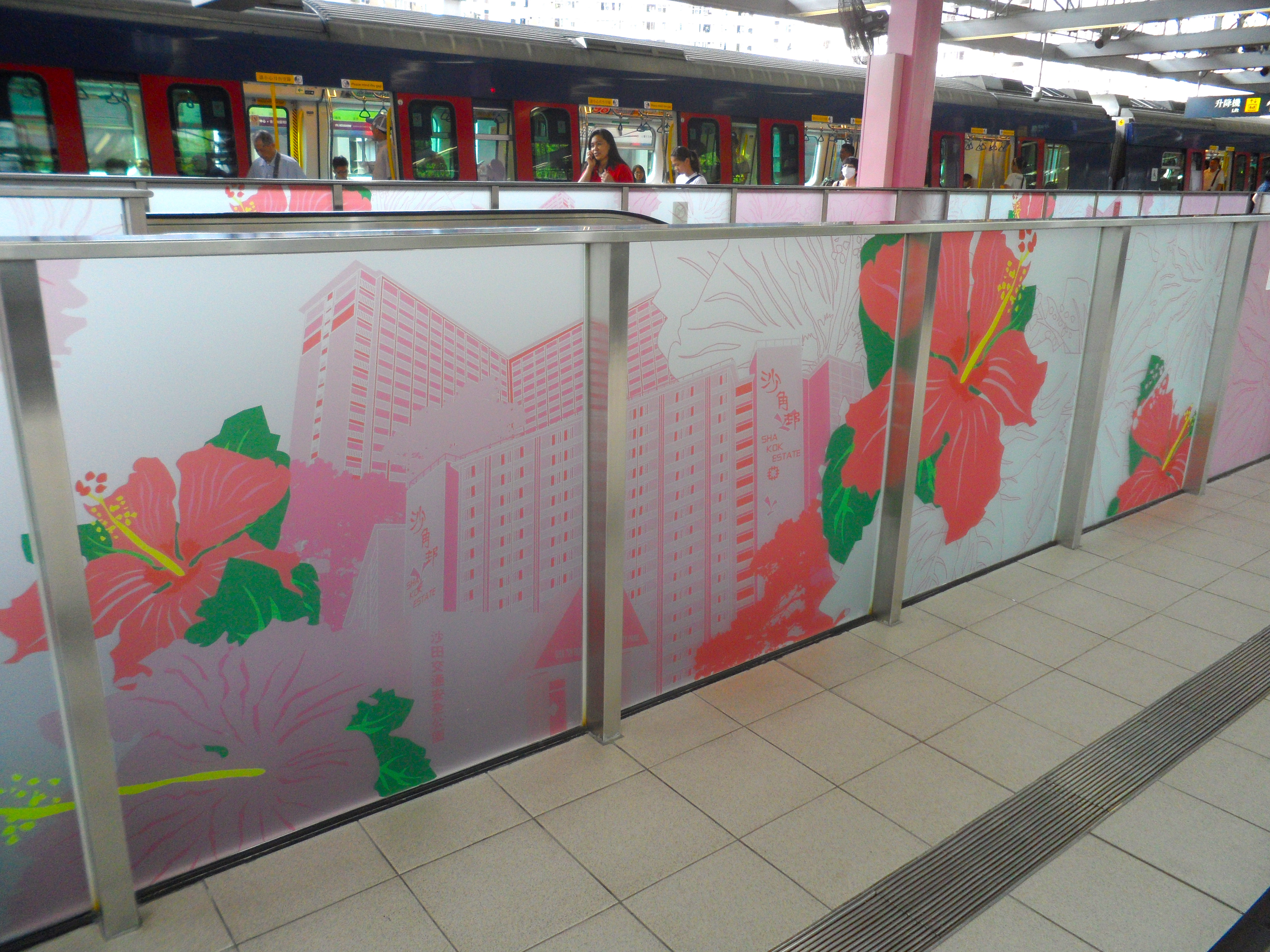 港鐵沙田圍站月台佈置